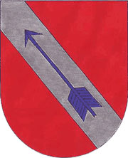 Nebovidy u Kolína znak